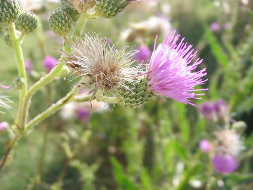 Cirse de Montpellier, photo P40p sur enciclopedia libre (Source)